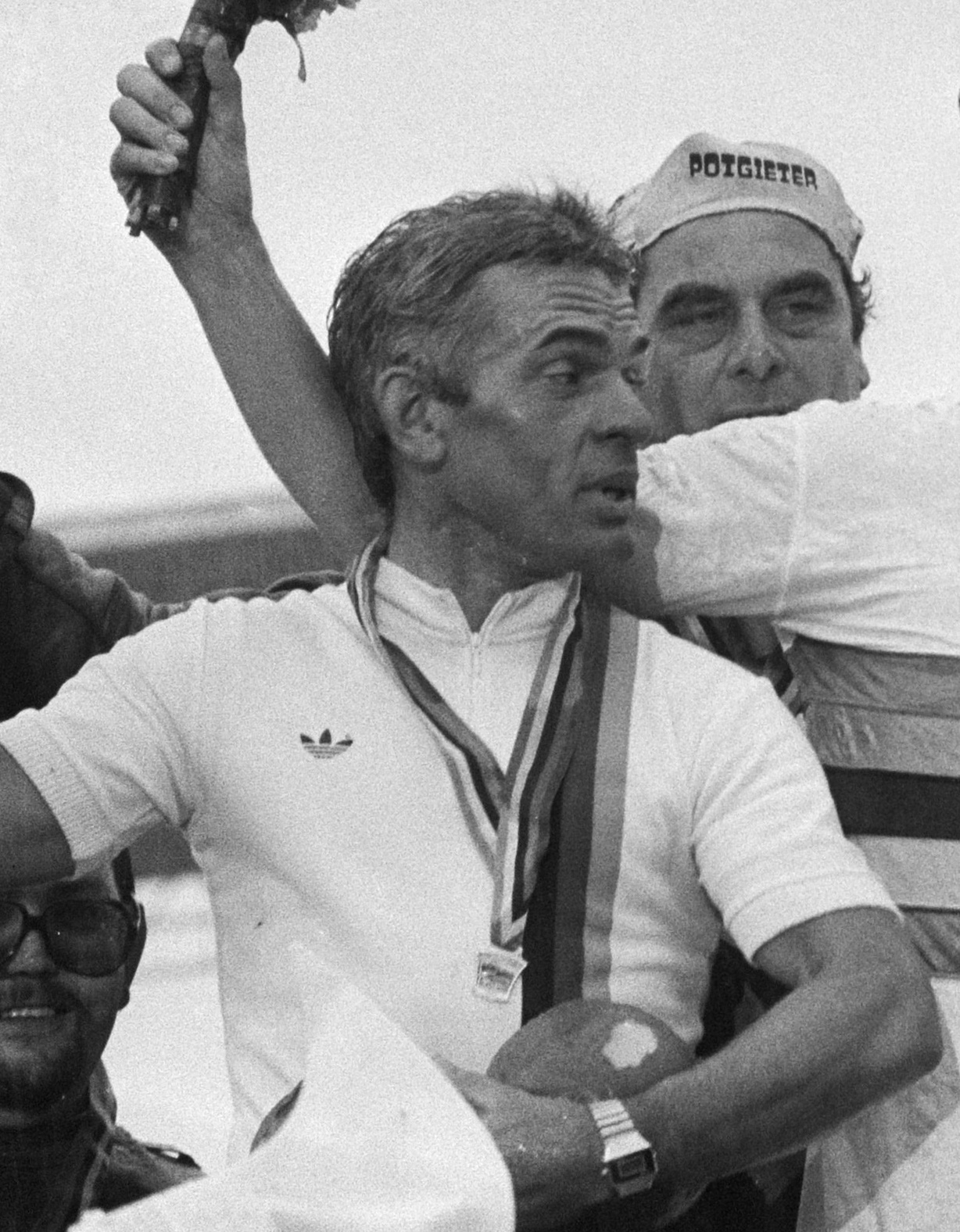 Wilfried Peffgen. Wereldkampioenschappen Wielrennen 1979 in het Olympisch Stadion in Amsterdam, stayeren voor profs